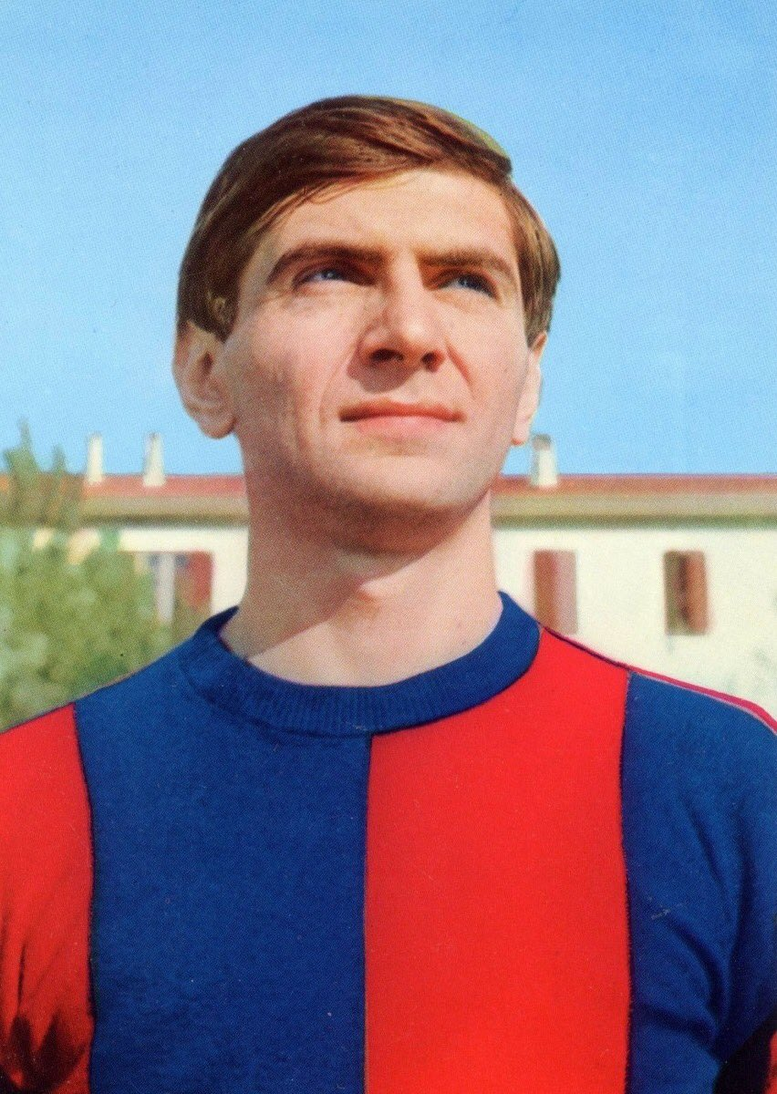 Il calciatore italiano Giacomo Bulgarelli al Bologna tra gli anni 50 e 70 del XX secolo.